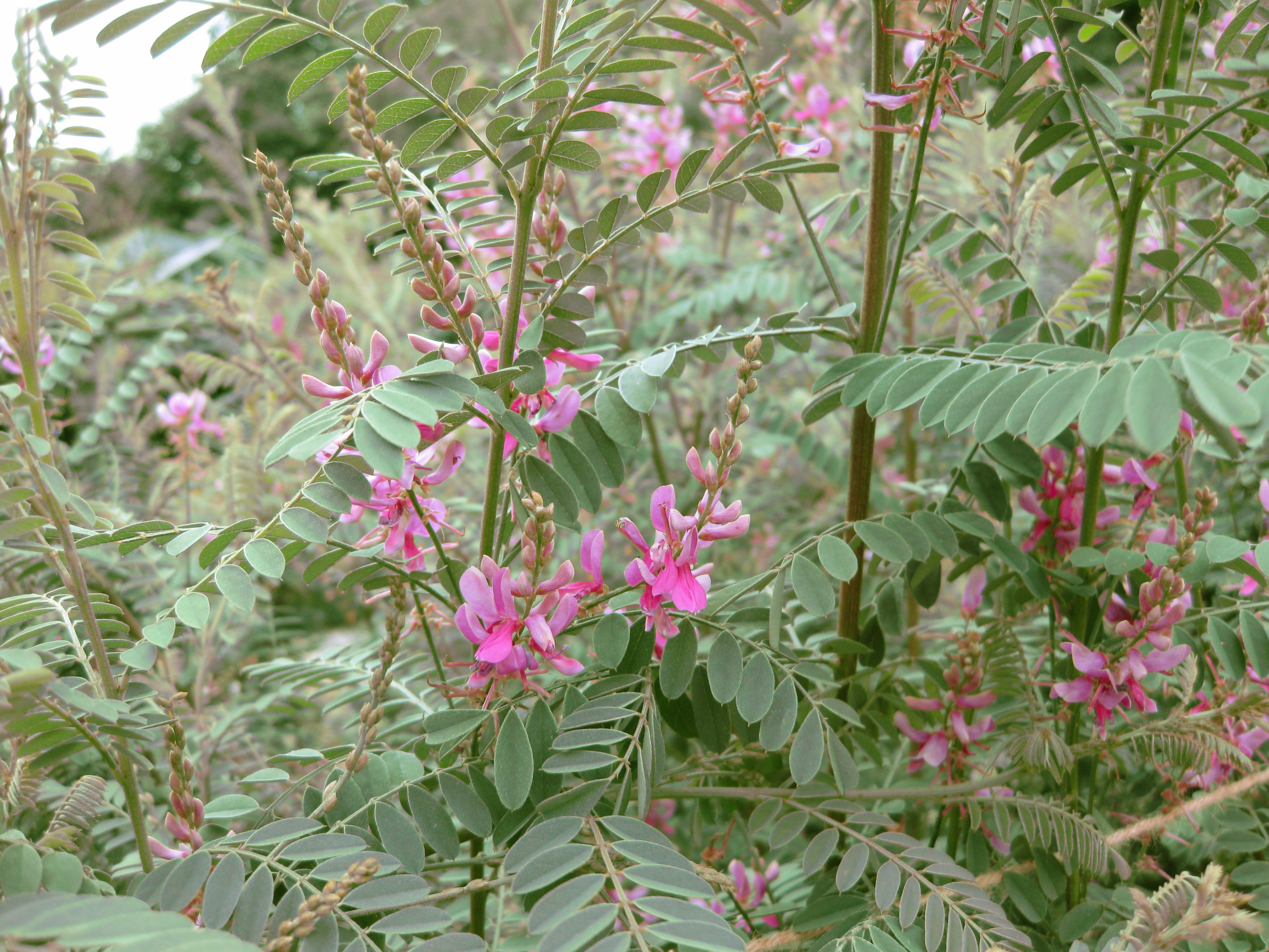 Himalaya-indigo himalaya. Botanical garden in Copenhagen, Danemark